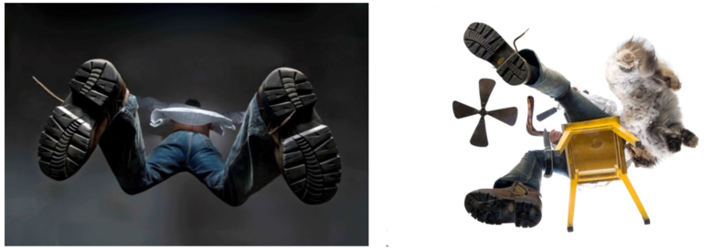 The Big Levitation, Print Durst Lambda pe suport de aluminiu, 2010, 160x100cm